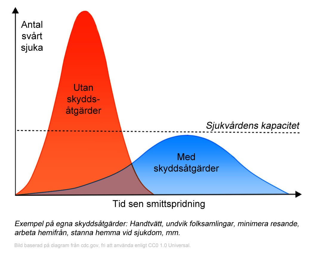 Diagram som visar skyddsåtgärders effekt för att begränsa belastningen på sjukvård vid smittspridning. Skapat för utbrottet av covid-19. Eget verk baserat på information från : . English language version at